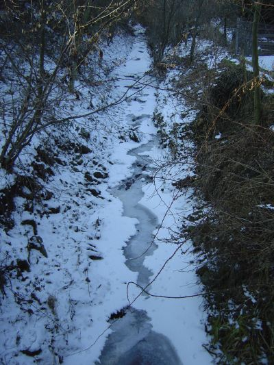 Verlauf der Körsch gleich nach dem Zusammentreffen der Quellbäche im Winter.